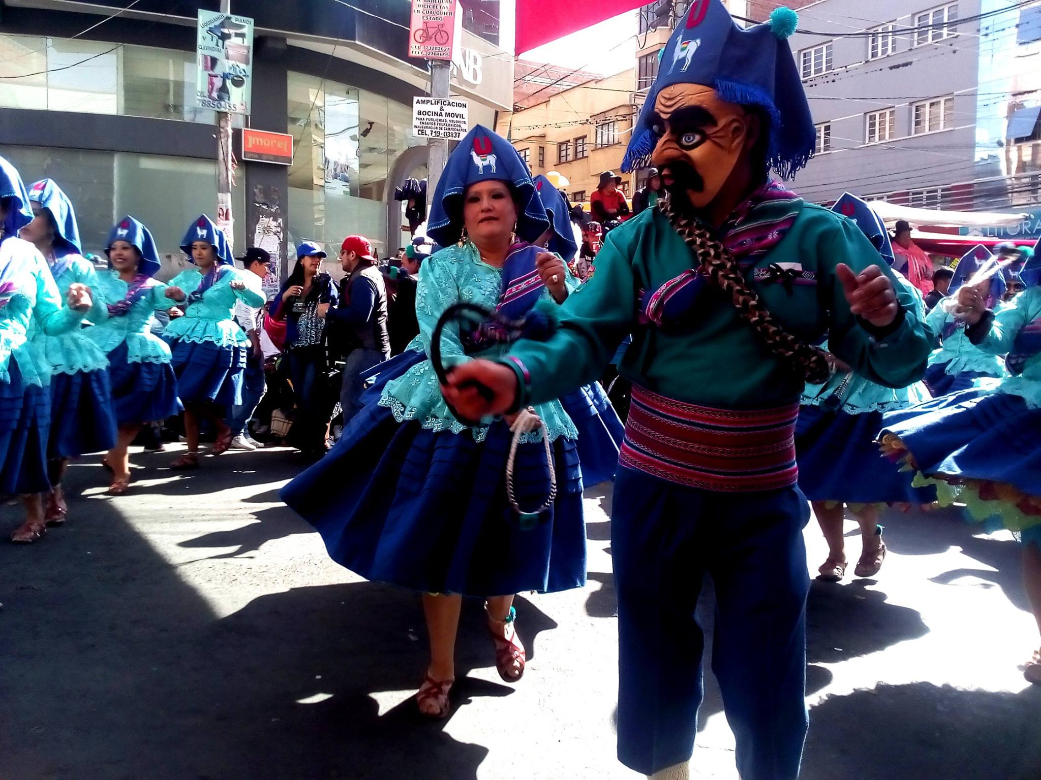 La Paz Bolivia 2017